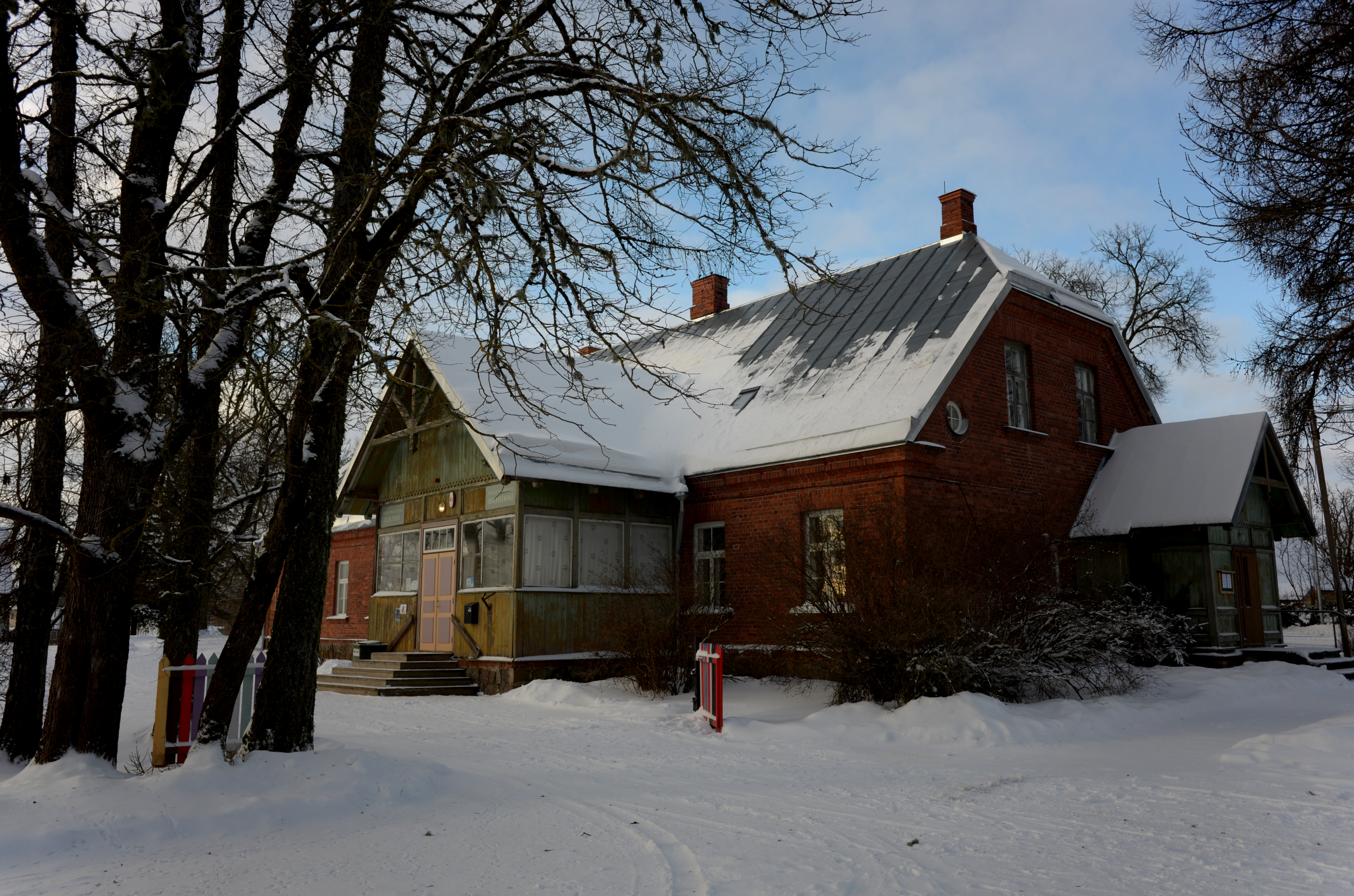 Maarja-Magdaleena pastoraat 2019. aastal